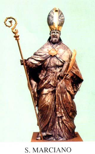 San Marciano de Siracusa San Marziano di Siracusa.